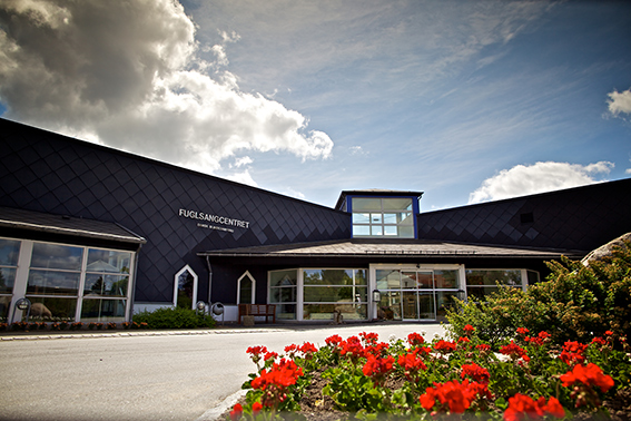 Fuglsangcentrets indgangsparti